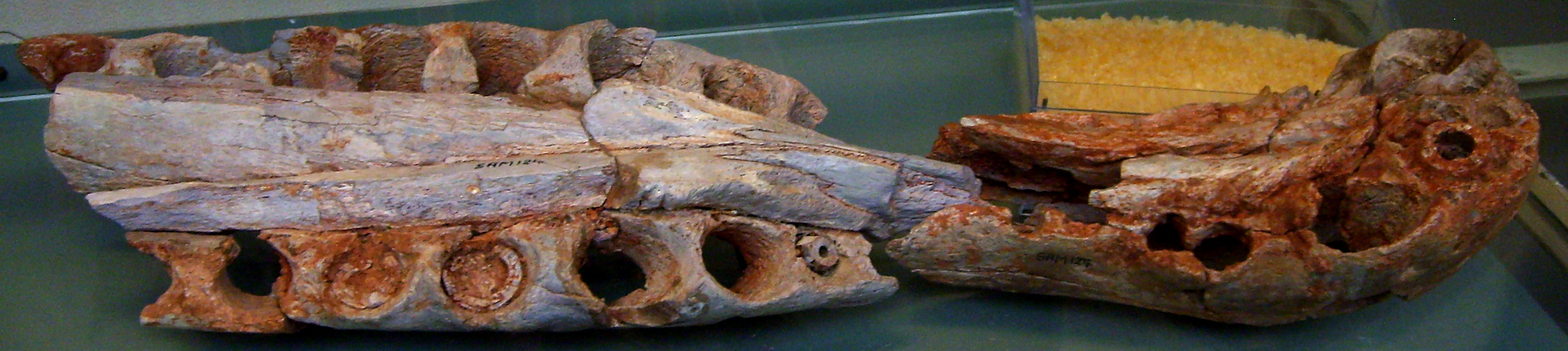 Spinosaurus marocannus jaw fossil (MNHN SAM 124), Muséum national d'Histoire naturelle, Paris.